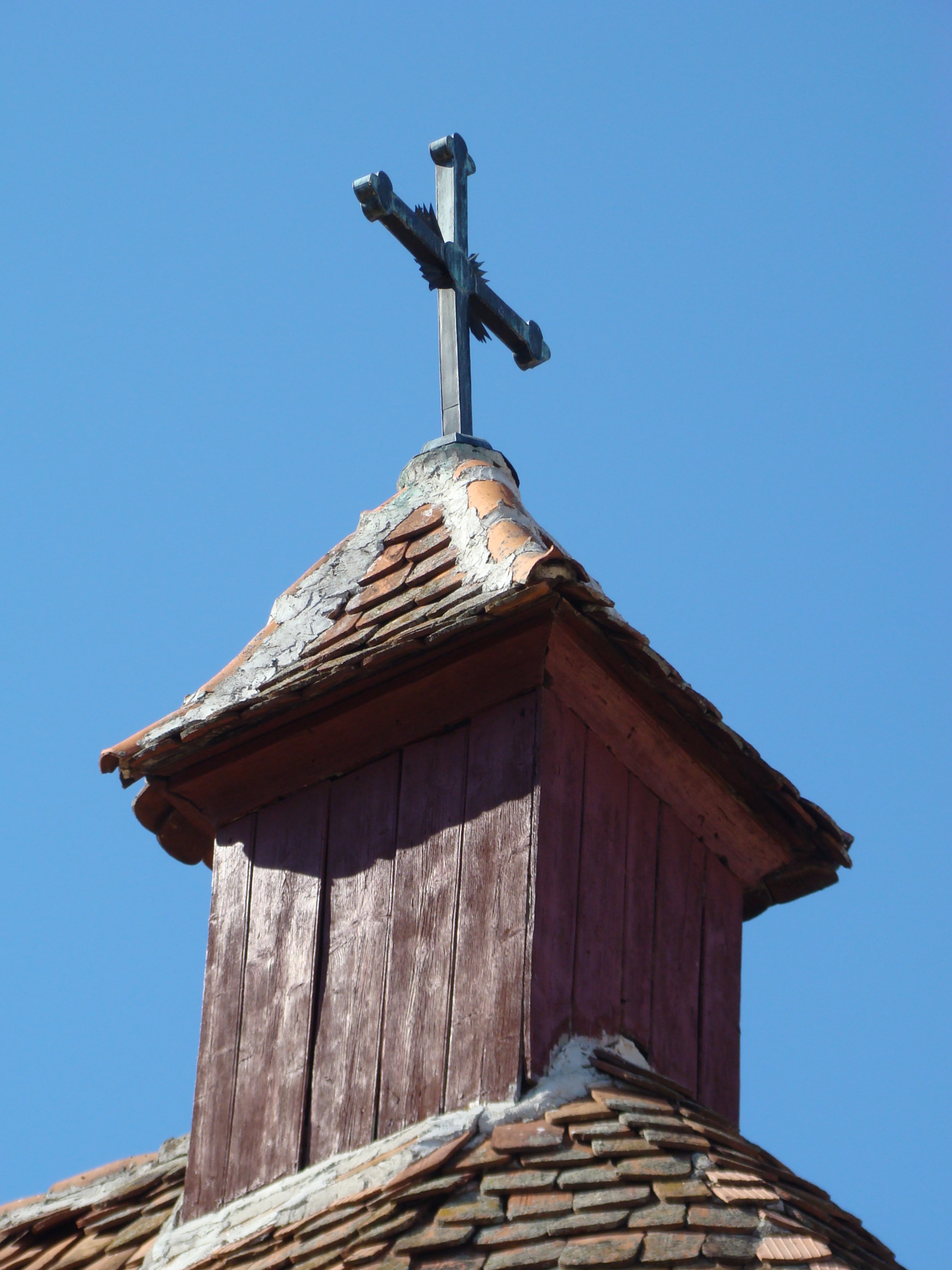 Biserica "Înălţarea Domnului" , oraş SĂLIŞTE